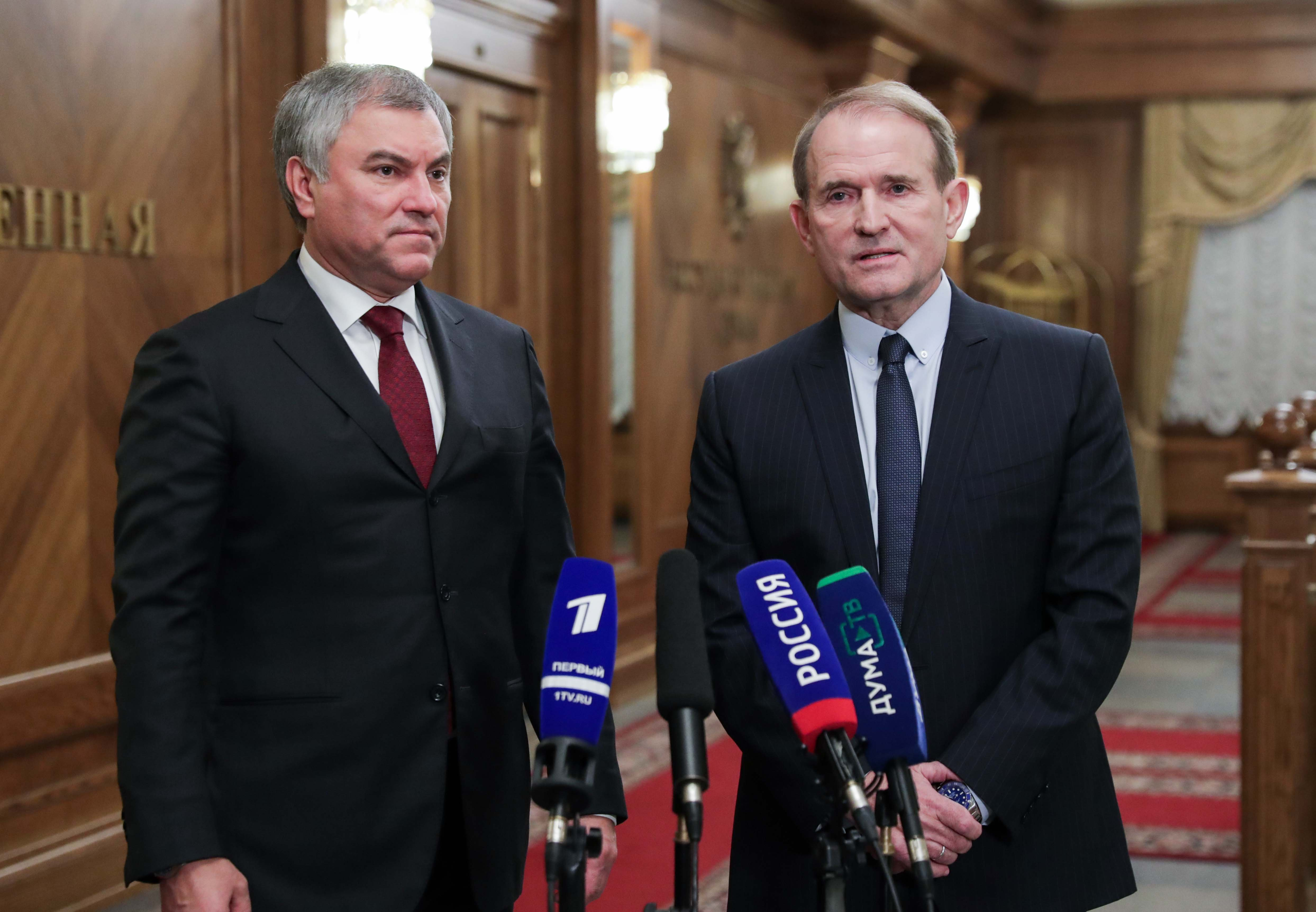 Виктор Владимирович Медведчук (род.1954) — украинский политический деятель